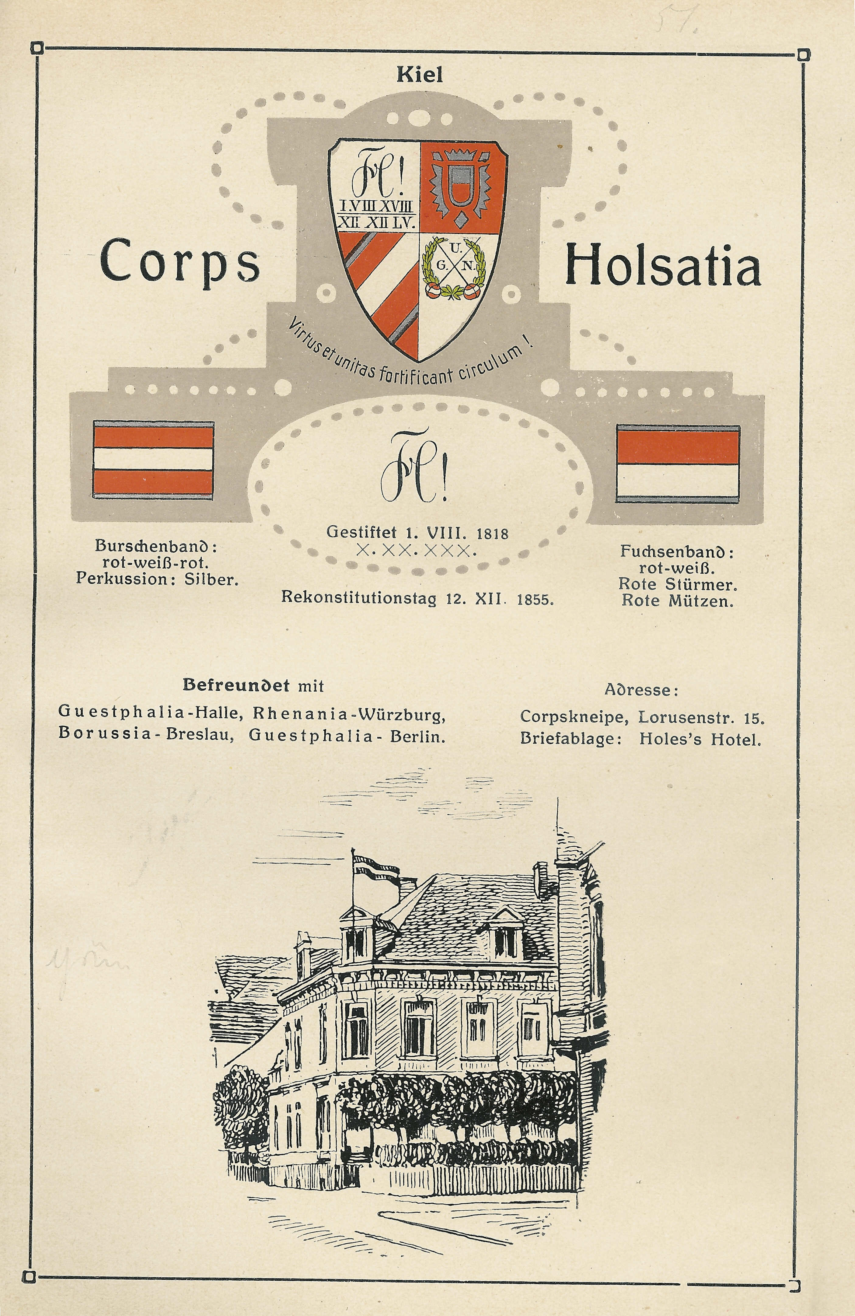 Wappen, Zirkel, Couleur und altes Corpshaus der Holsatia Kiel